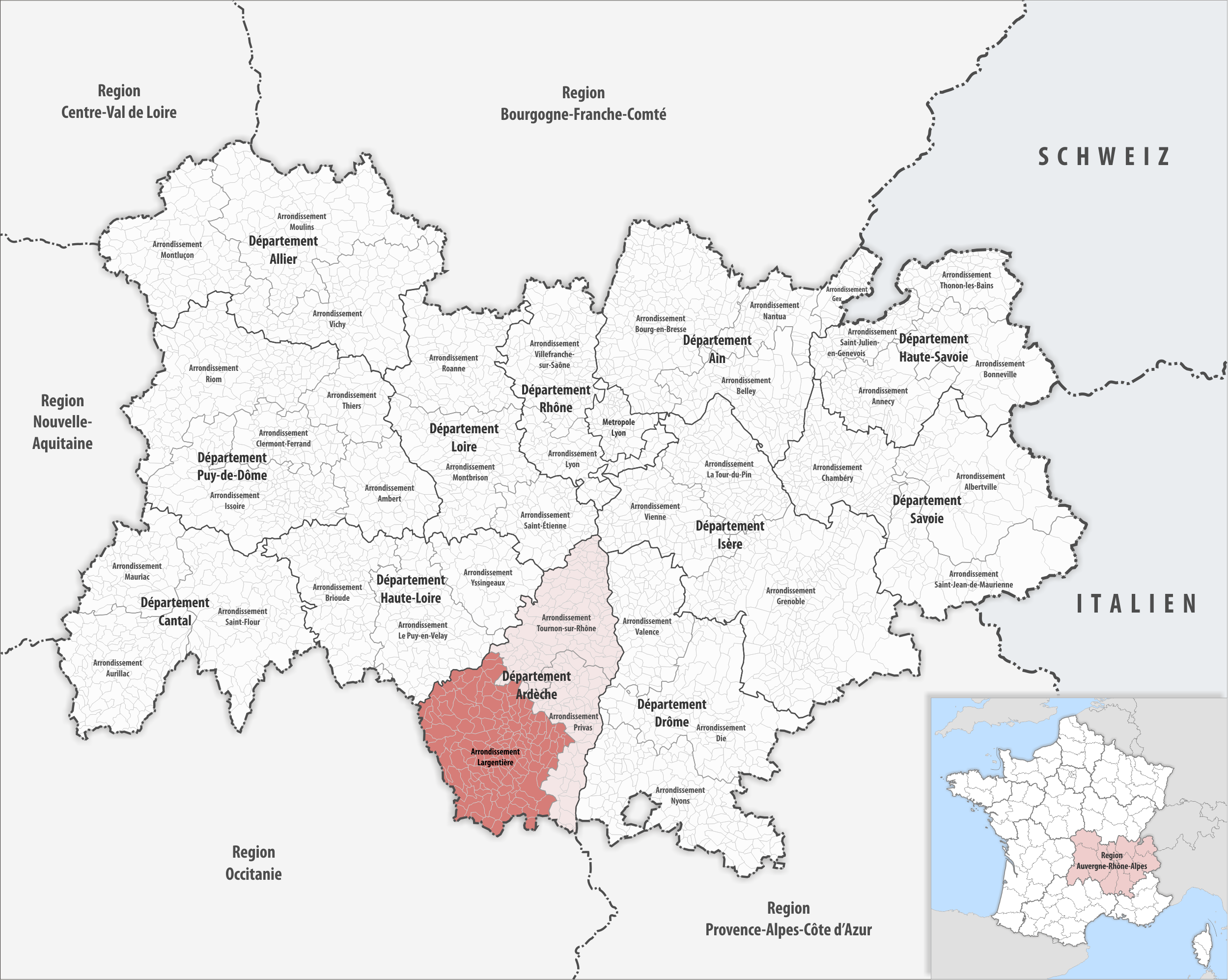 Lage des Arrondissements Largentière